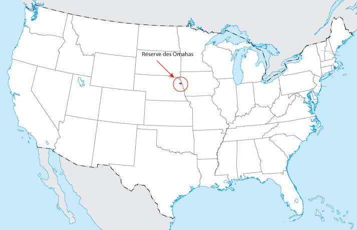 Sujet : Carte de la réserve des Omahas (Indiens) Créateur : Valérie Date de création de l'image : 8 novembre 2004 Licence : Licence GFDL. Auteur : Utilisateur:Valérie75 Utilisateur:Valérie75